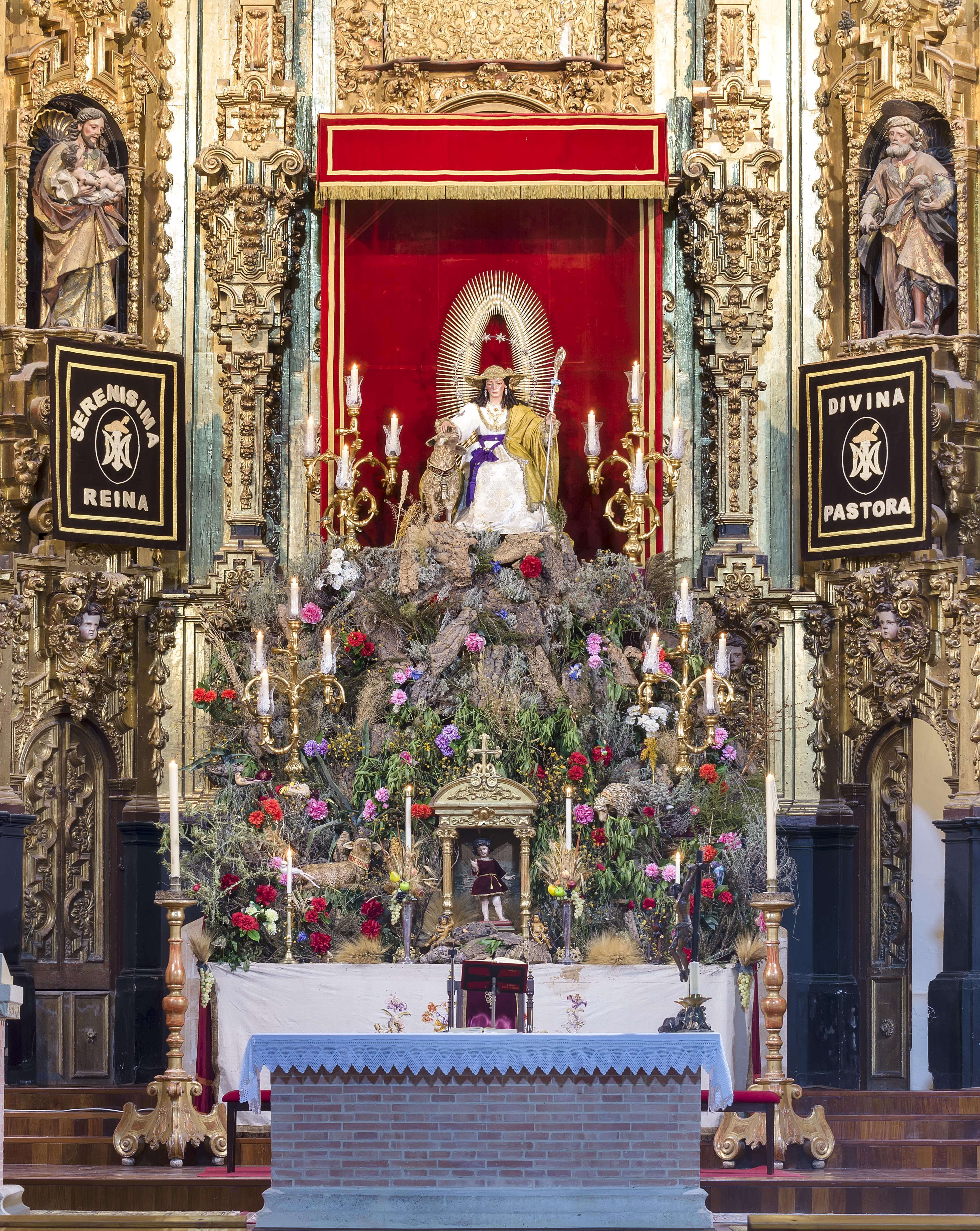 Cultos